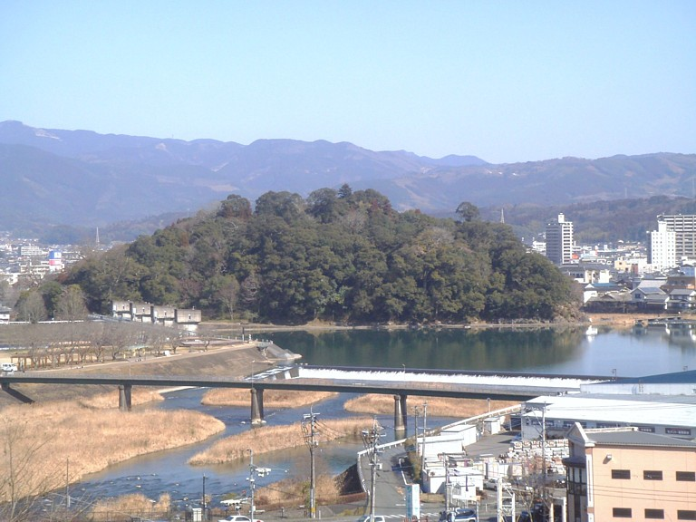 日本国大分県日田市の亀山公園を、同市南部にある鏡坂公園から撮影。